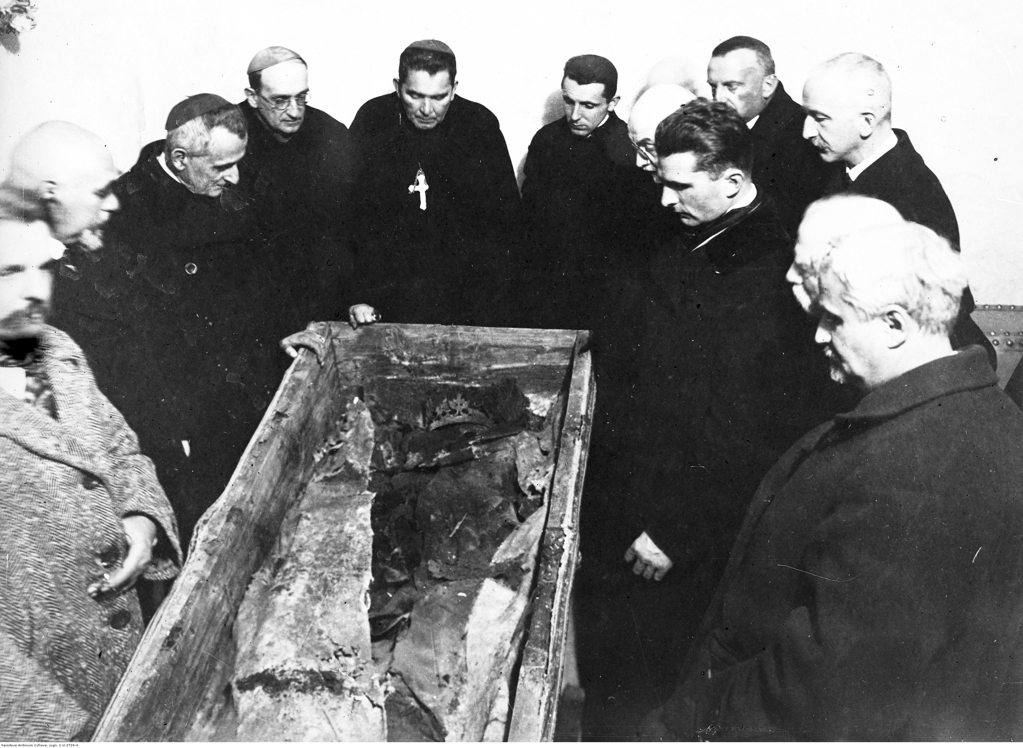 Szczątki króla Zygmunta Augusta. Przy trumnie stoją od lewej m.in.: prof. Tadeusz Estreicher (1.), wiceprezydent Krakowa Witold Ostrowski (2.), metropolita krakowski ks. arcybiskup Adam Sapieha (2.), biskup pomocniczy łucki i żytomierski Michał Godlewski (4.), biskup pomocniczy krakowski Stanisław Rospond (4.). Od prawej stoją m.in.: dyrektor Muzeum Narodowego w Krakowie Feliks Kopera (1.), prof. UJ ks. Tadeusz Kruszyński (3.), prof. Kazimierz Władysław Kumaniecki (na prawo za ks. Kruszyńskim).